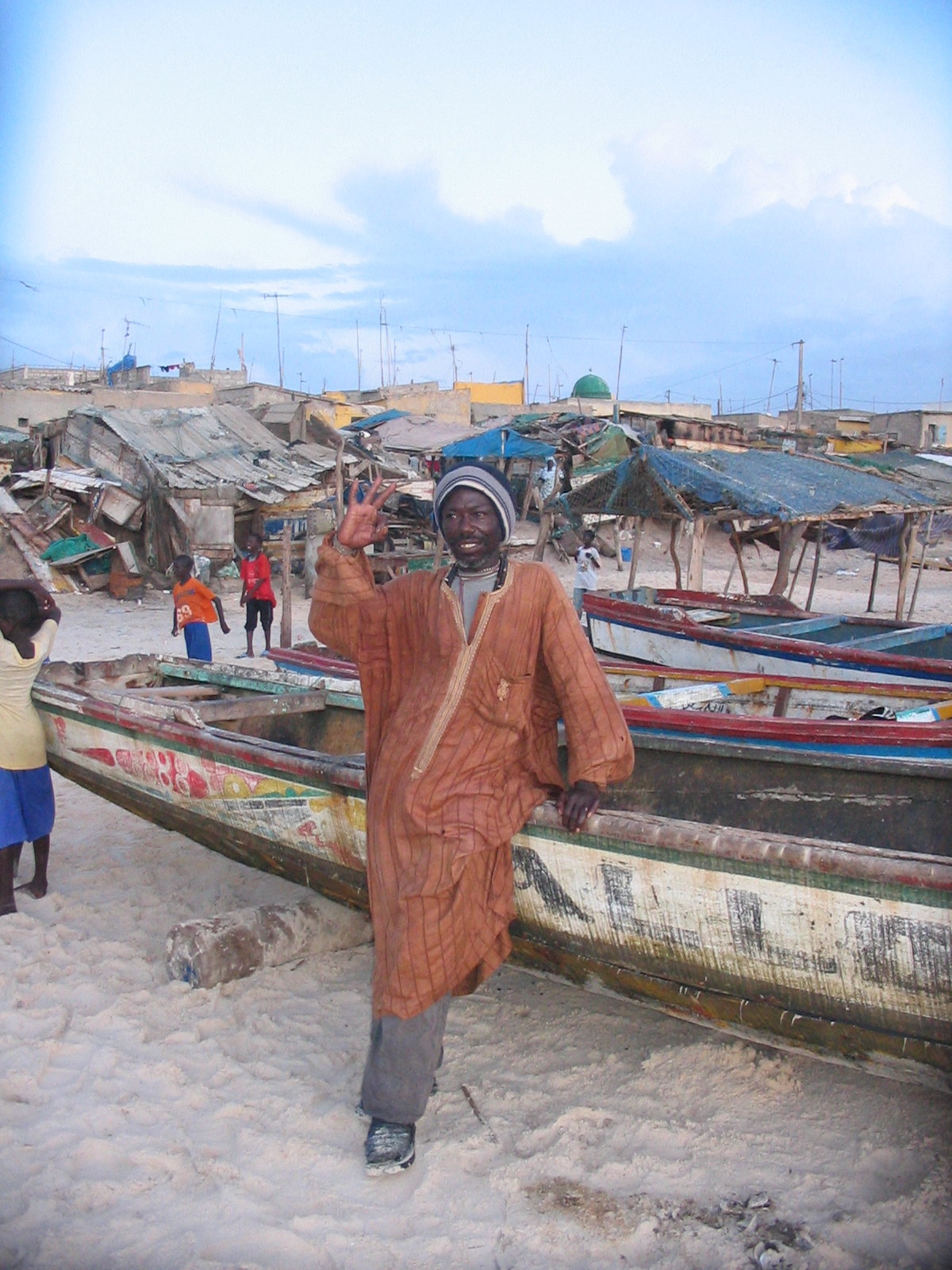 Cheick Bandiane, un marabout pescar din Saint Louis.